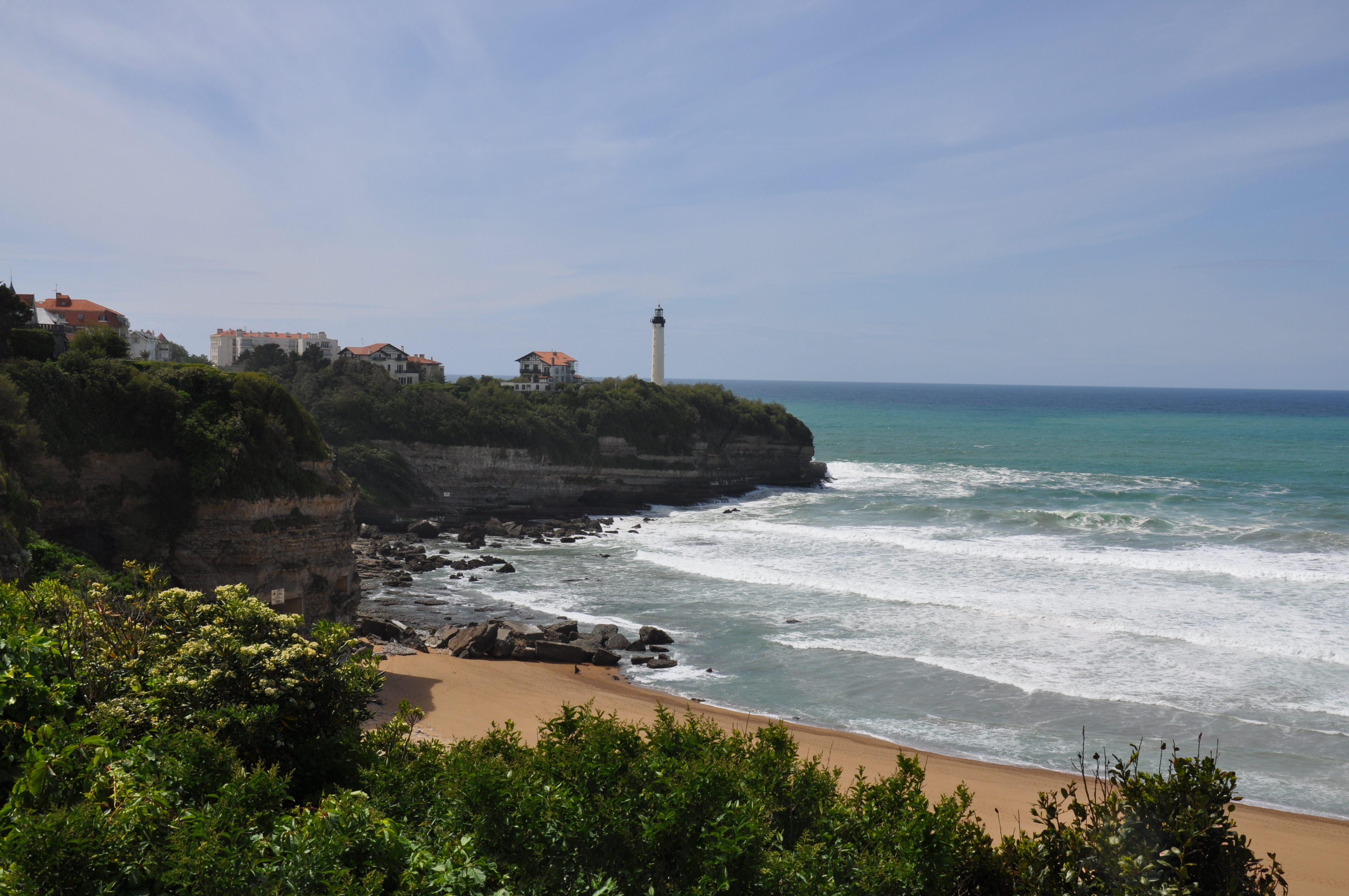 Plage de la chambre d'Amour à Anglet - 2017